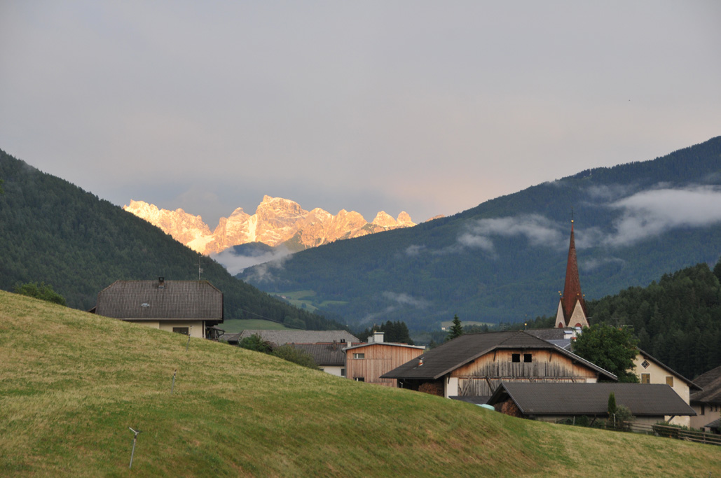 Blick Richtung Oberpustertal